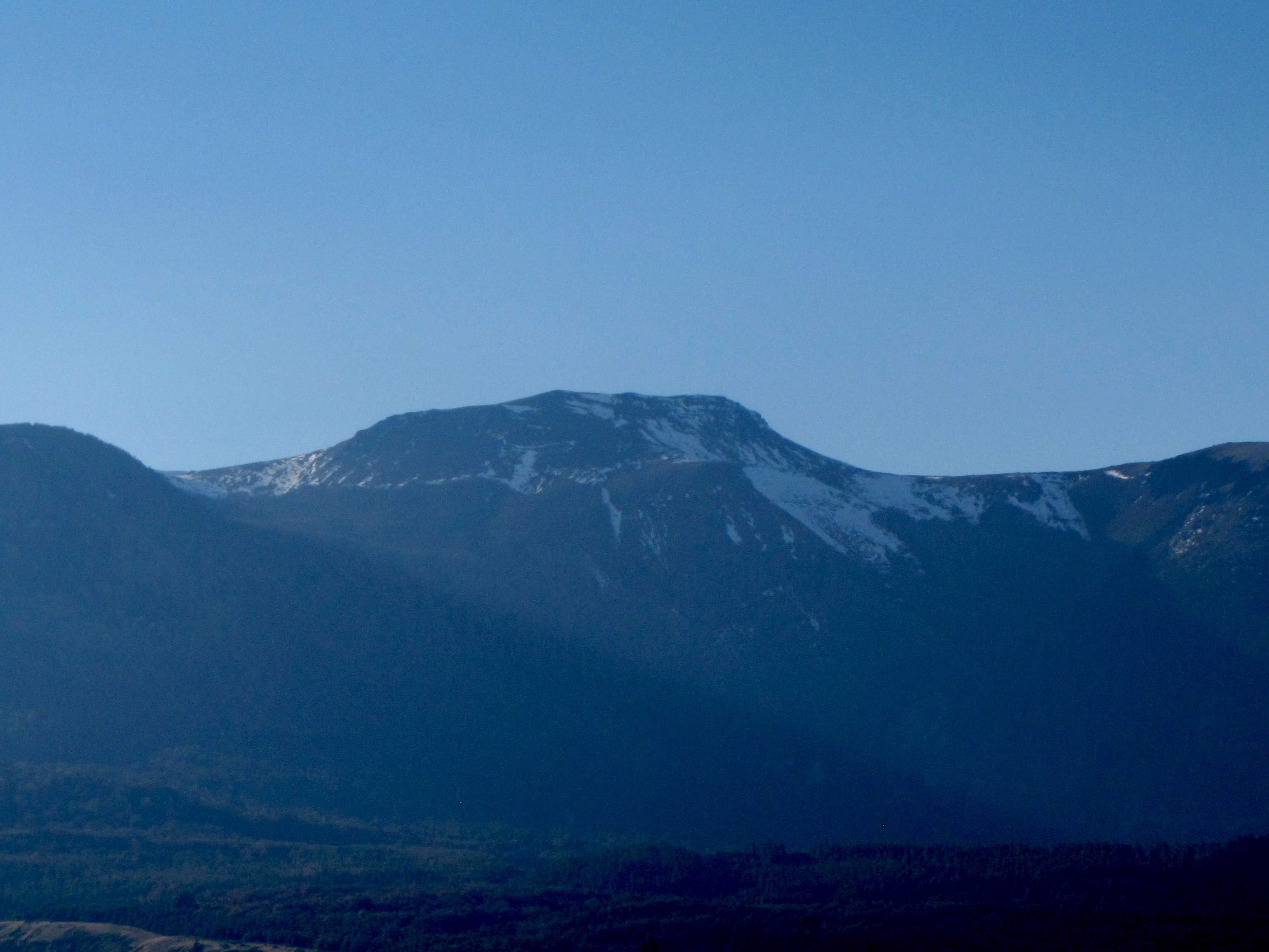 Cerro Cinchao, al norte de Coyhaique, región de Aysén, Chile